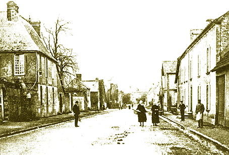 Les écoles